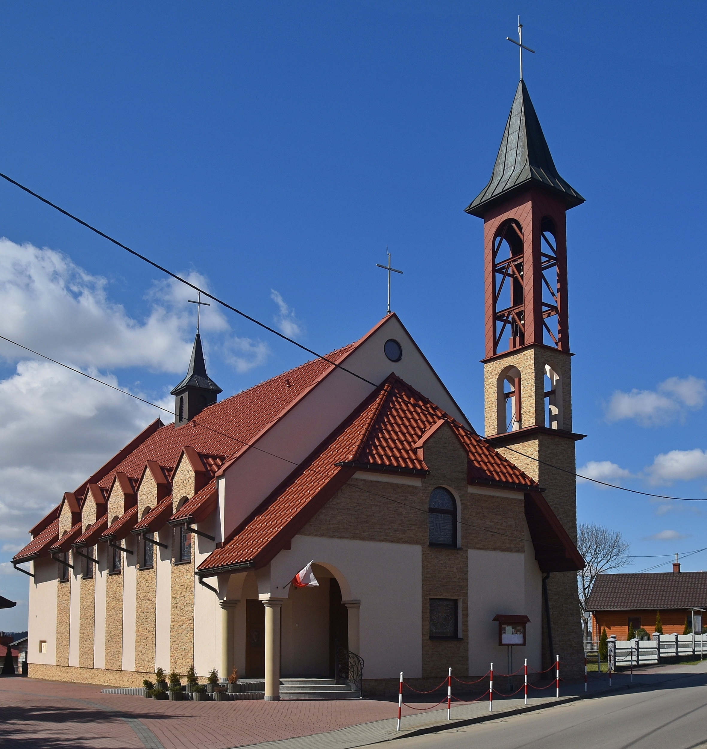 Lisów (województwo podkarpackie)